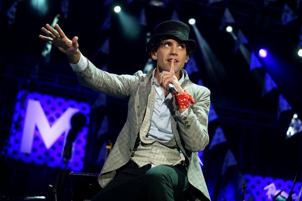 Mika, Ronquières Festival, 04 Aout 2013.